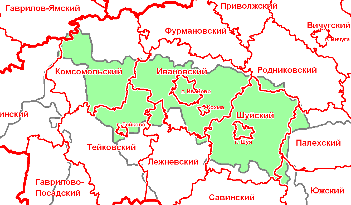 Шуйский уезд в современной сетке районов.